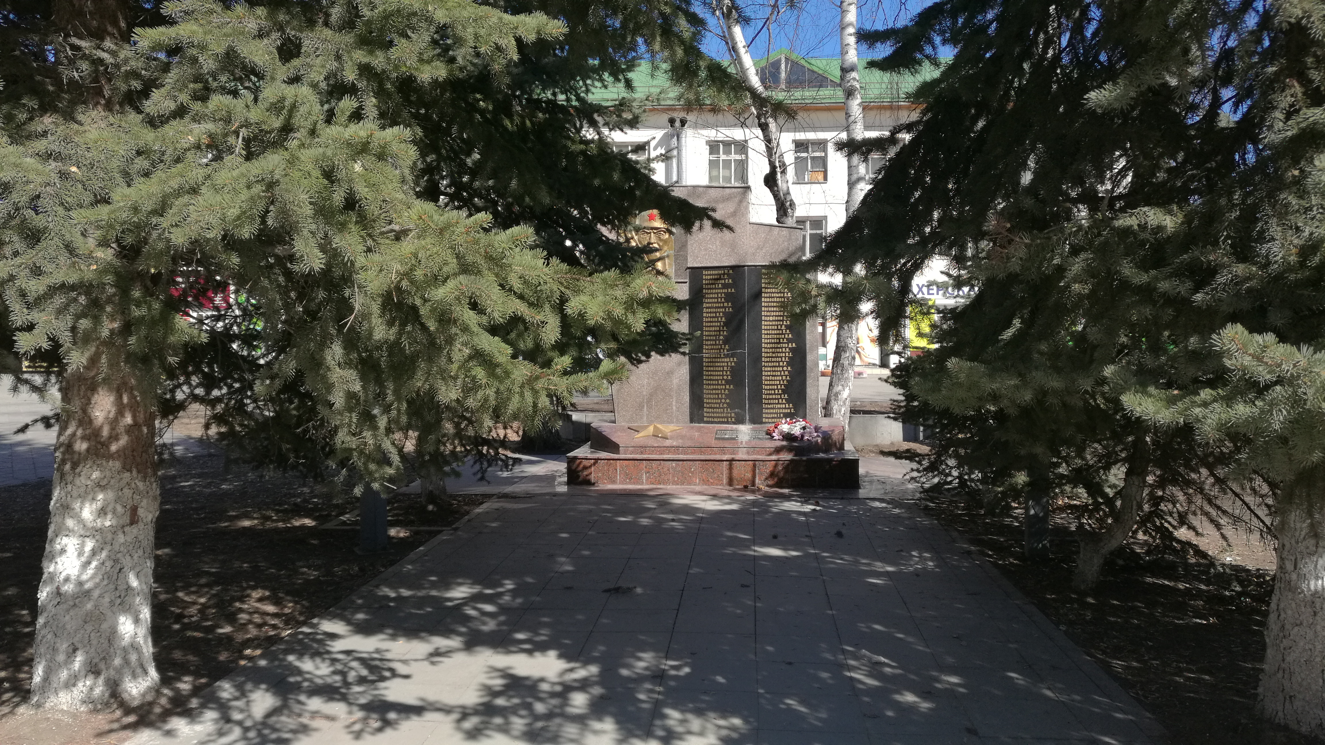 Skvaro de Maŝinkonstruistoj. Tjumeno, Rusio.